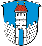 Wappen von Melsungen